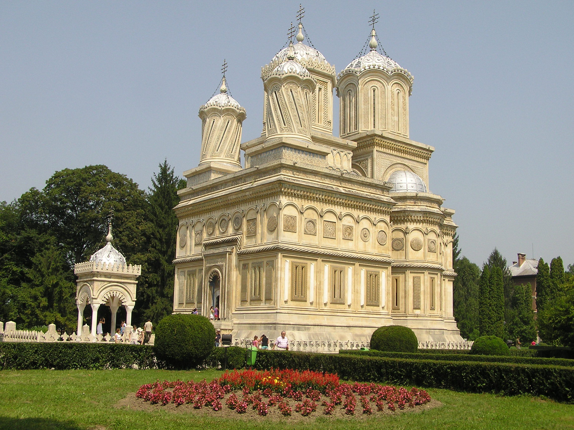 Die Kathedrale von Curtea de Argeş